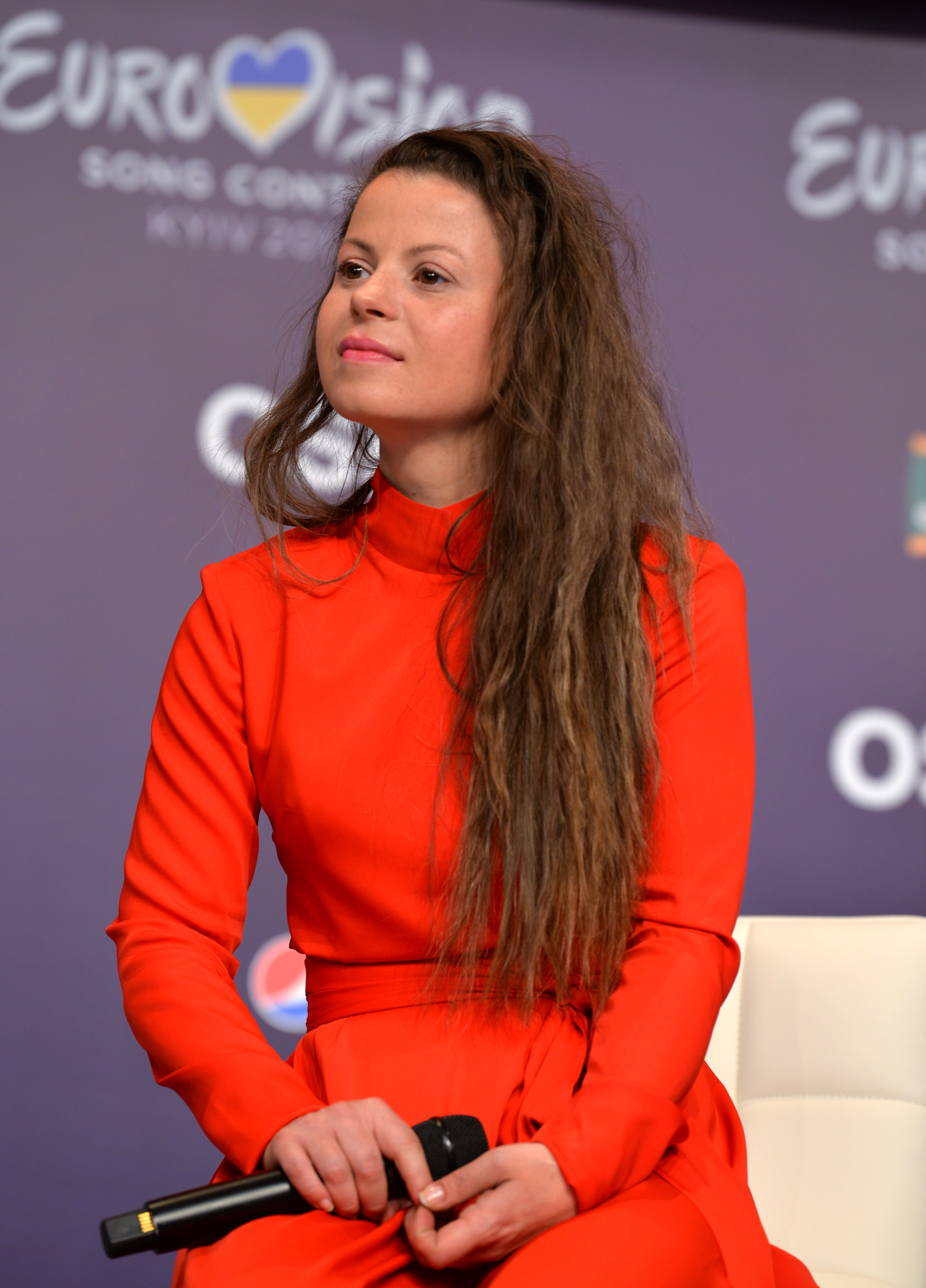 Viktoria Ivanovskaja from Fusedmarc in Kyiv